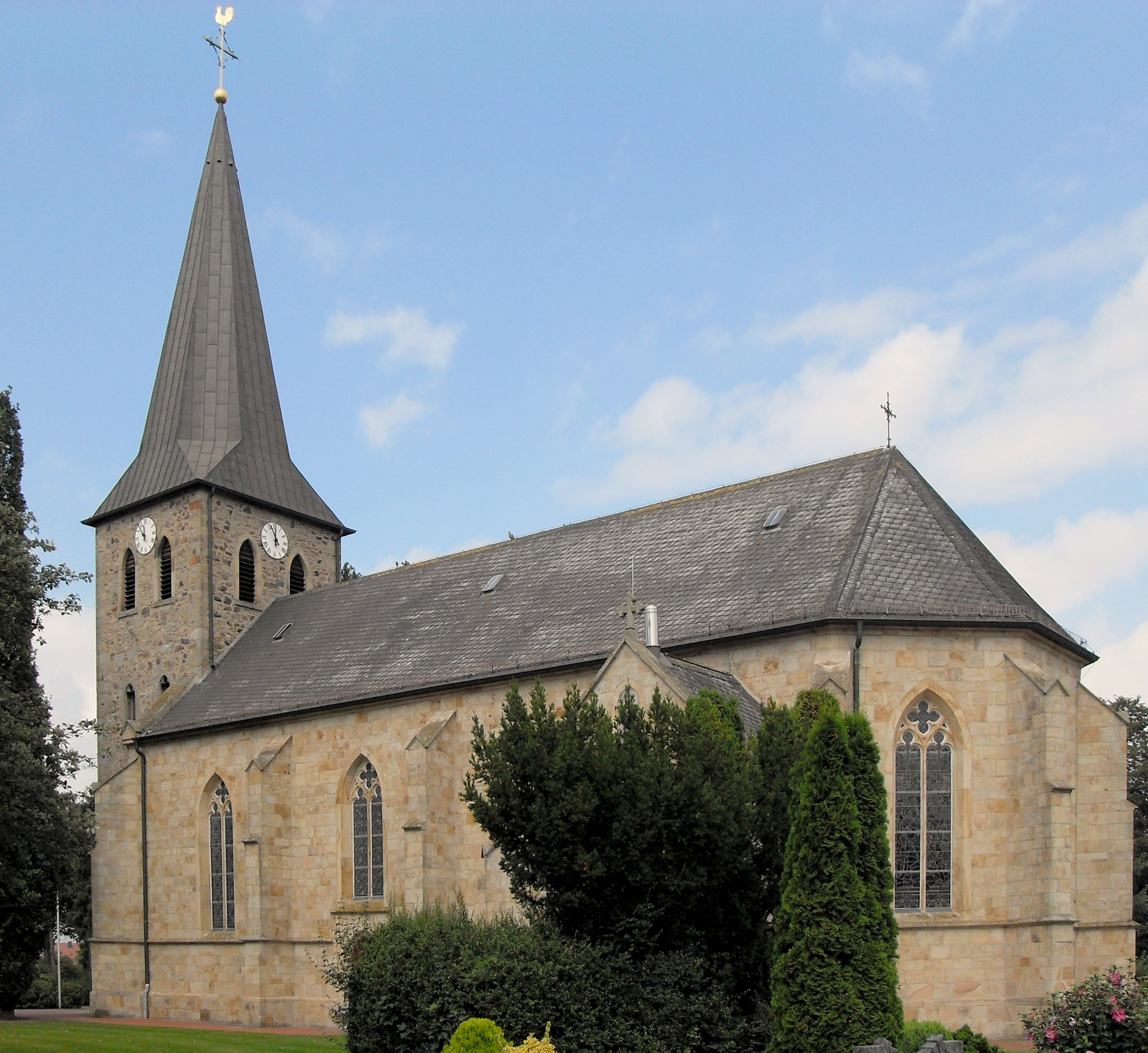 Pfarrkirche St. Antonius in Messingen, Landkreis Emsland